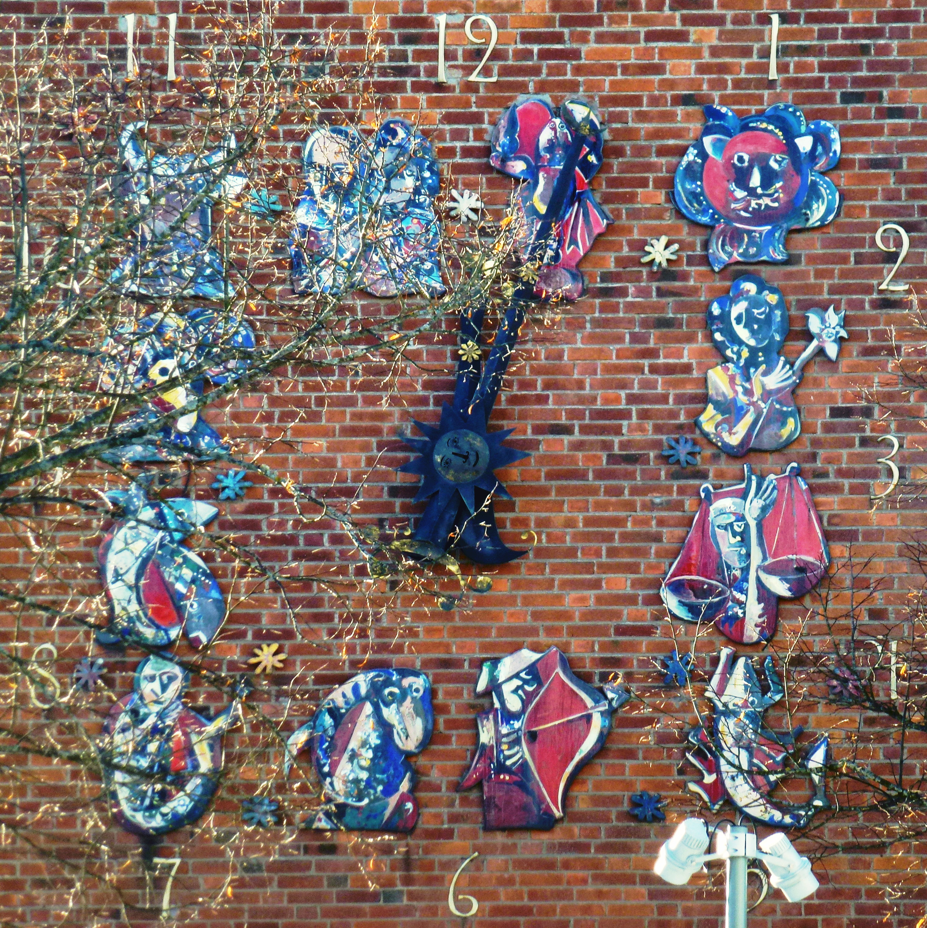 Zodiaken, emalj, 1950, fasaden till Störtloppsvägen 13 i Västertorp i Stockholm av Endre Nemes